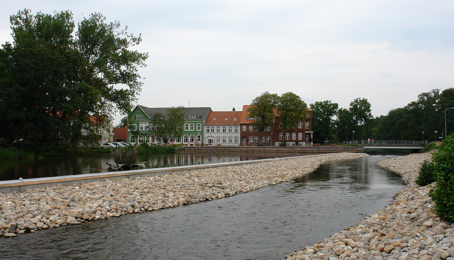 Tønder: Blick vom Kongevej über den neu gestalteten Vidåen auf die Søndergade